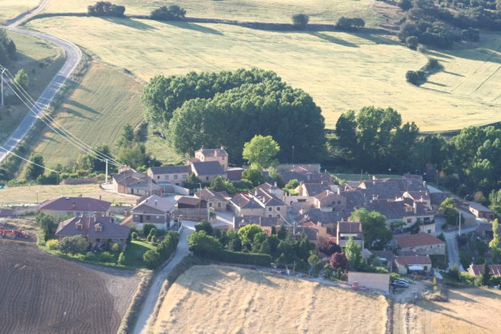 Peñarrubias de Pirón